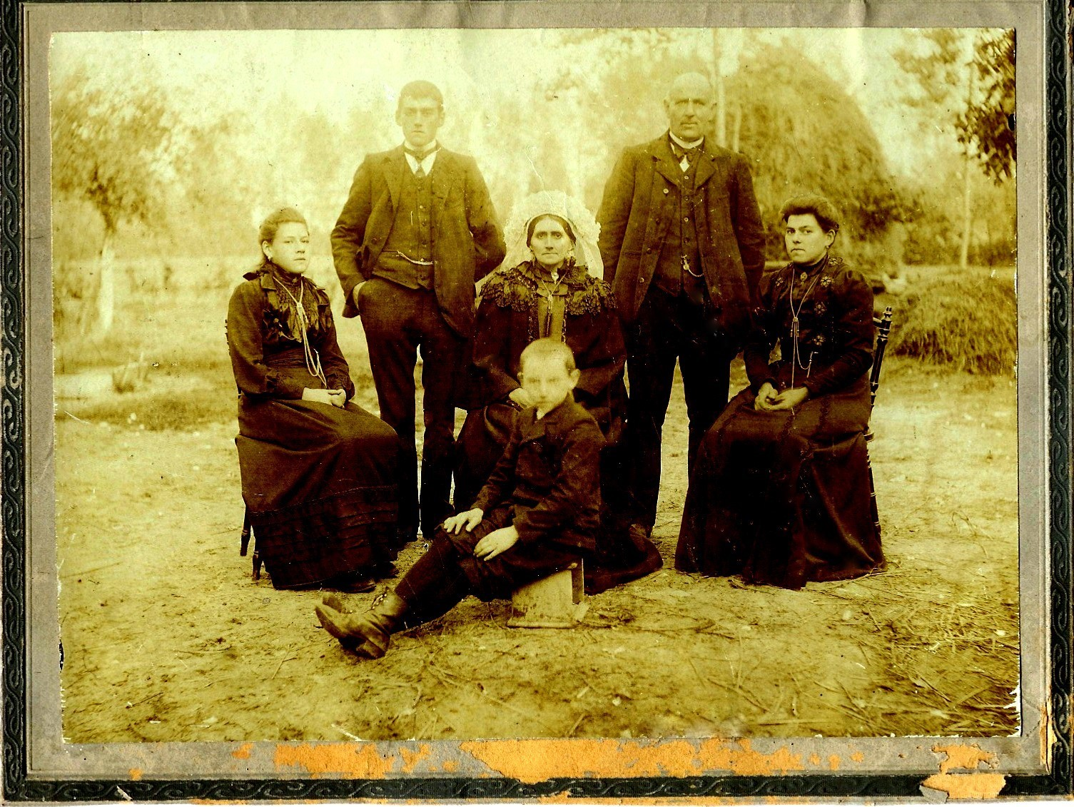 De familie Verbakel - van Thiel, vanaf 1885 eigenaren van de Plashoeve.